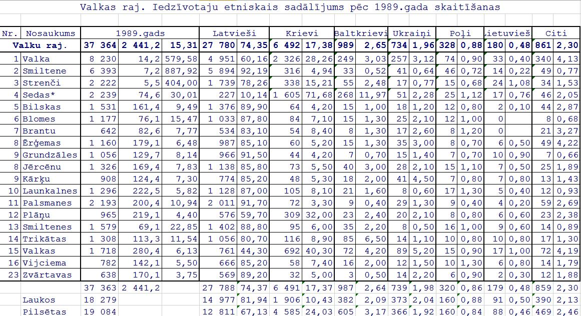 Этнический состав населения Латвии по переписи 1989 года